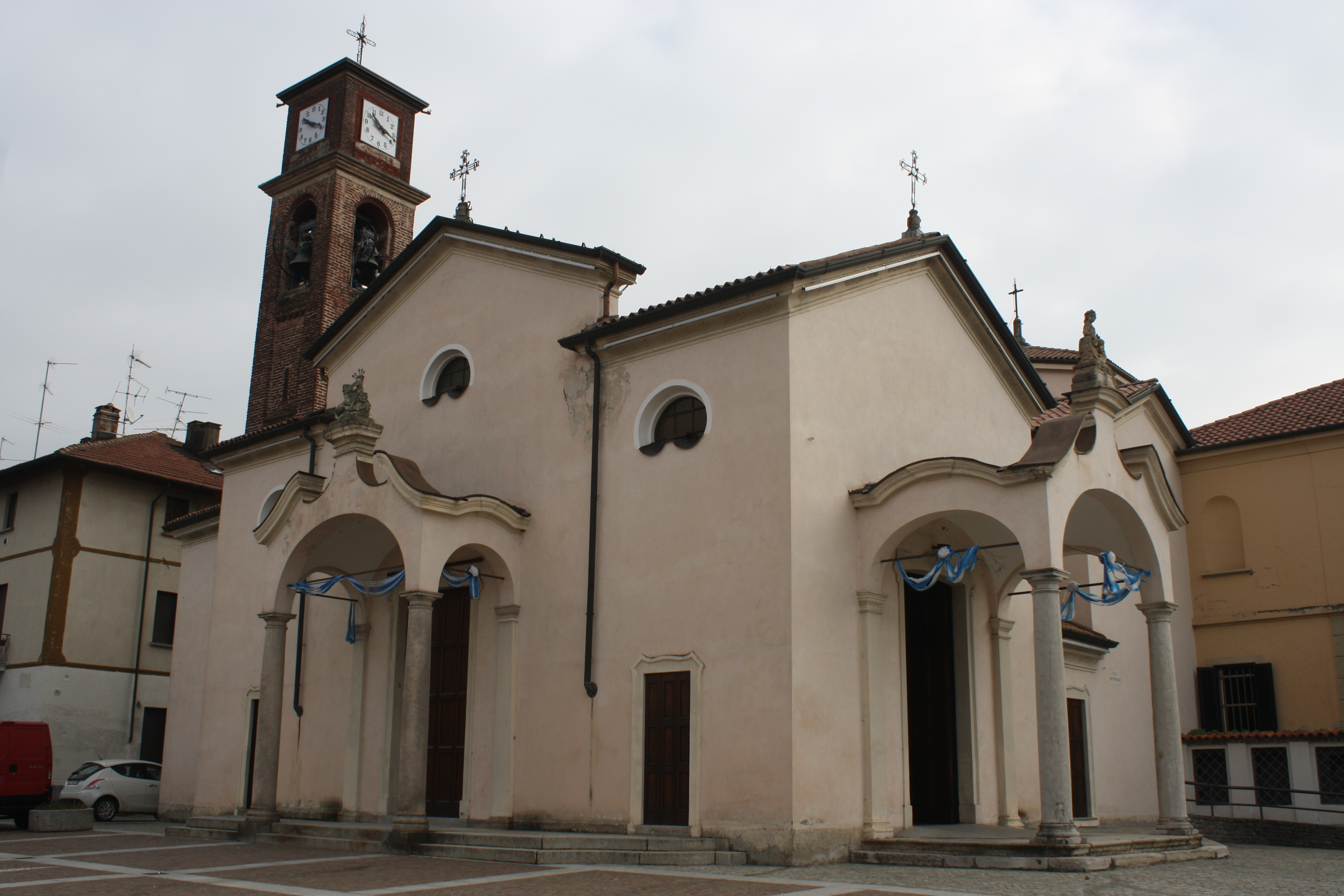 La chiesa di Santa Maria Solaro a Mozzate (VA).